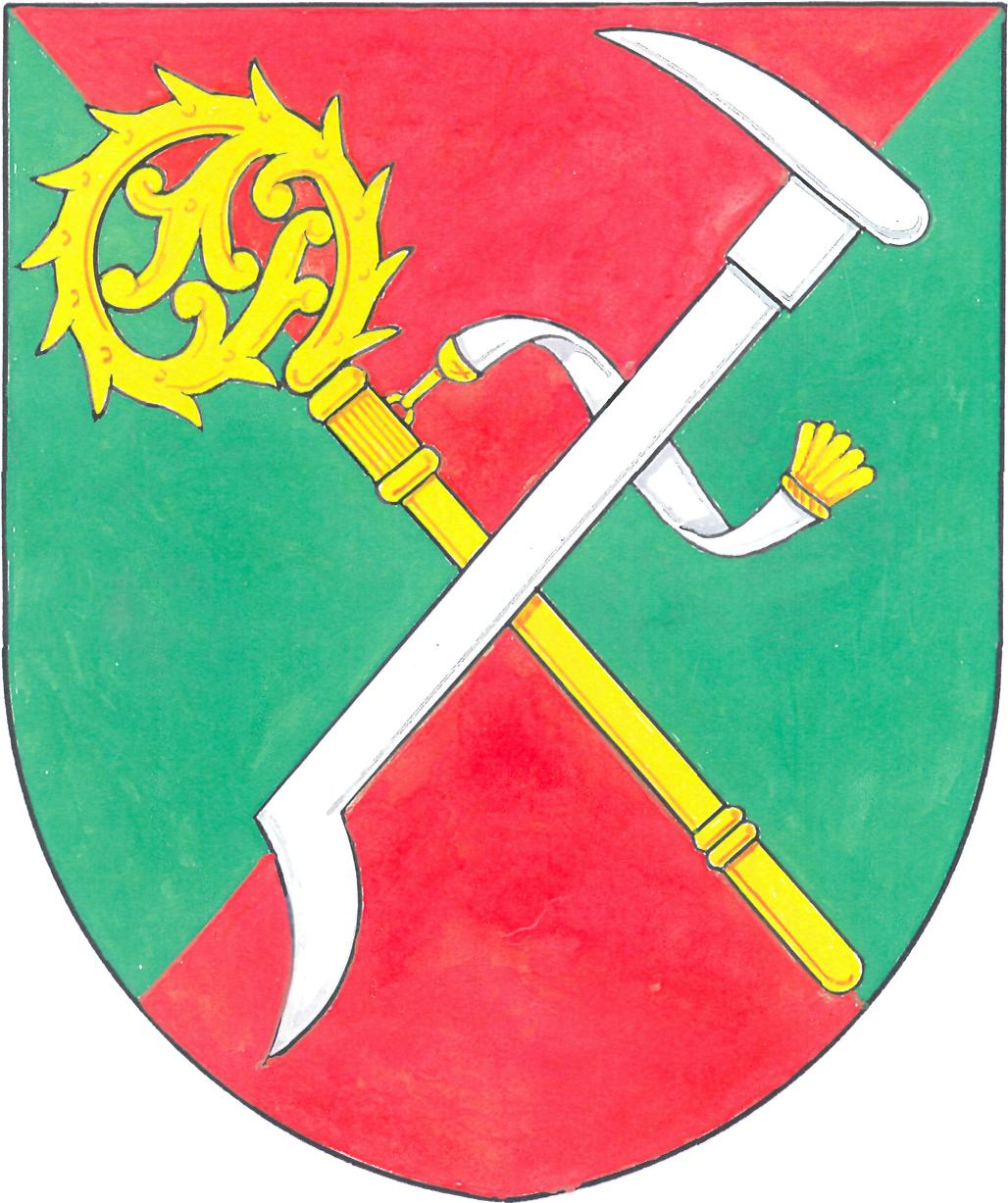 Česky: znak obce Želechovice